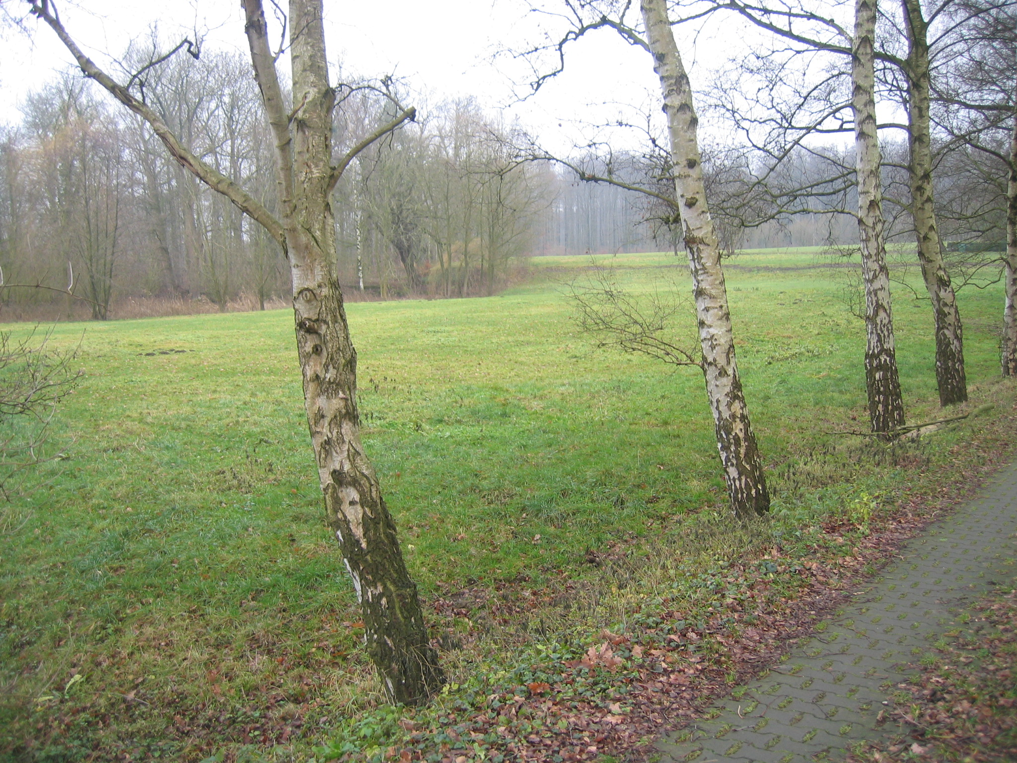 Etwa an dieser Stelle bei Rödinghausen-Bieren stand einst das Gut Waghorst. Der Bach (links außerhalb des Bildes und Bildhintergrund) war einst zu einem Mühlenteich aufgestaut, von dem kaum mehr als eine feuchte Niederung geblieben ist. Rechterhand (außerhalb) des Bildes steht eine moderne Scheune, die evtl. tlw. über die Fundemanete des alten Gutes gebaut wurde